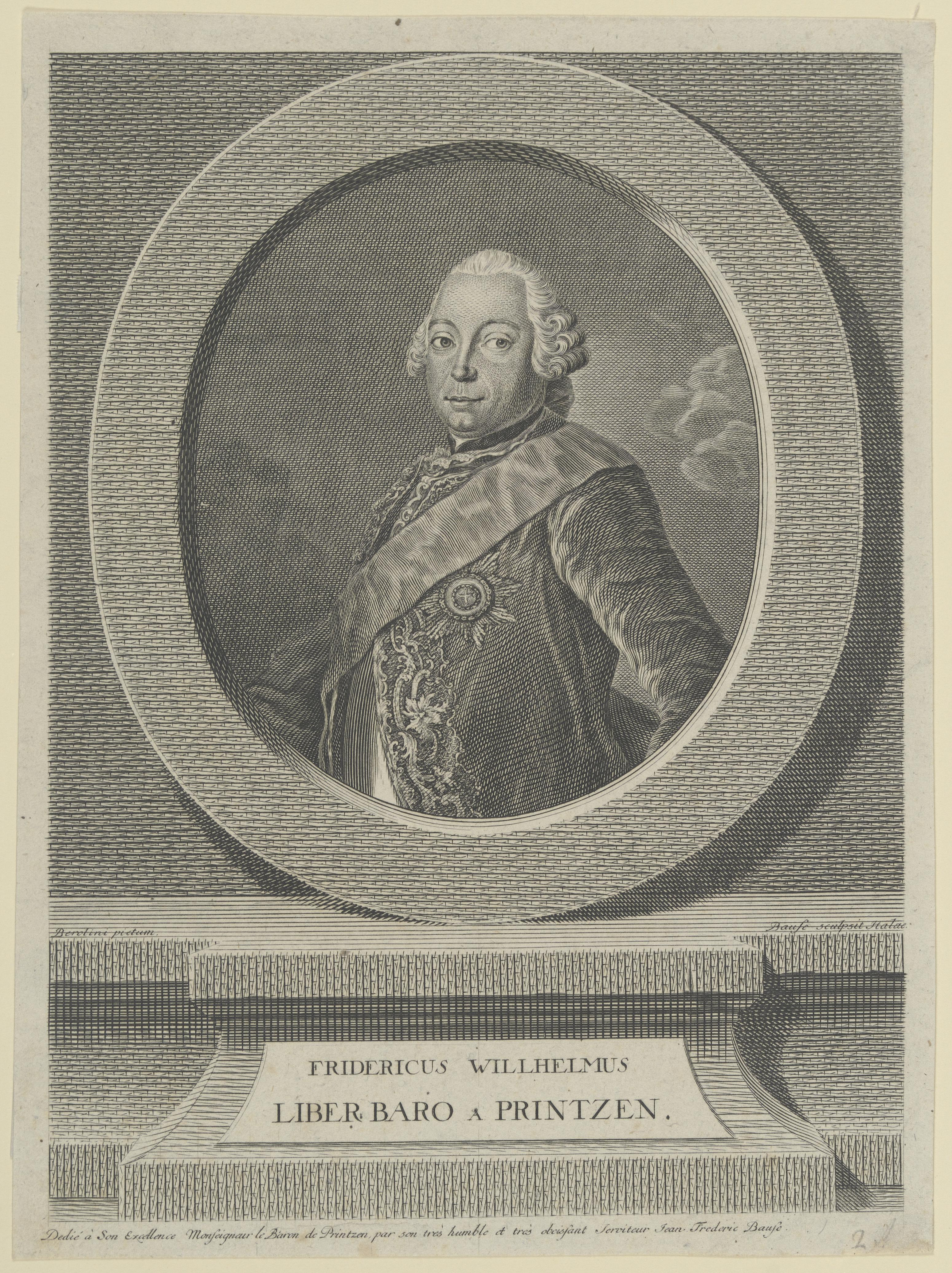 Fridericus Wilhelmus a Printzen (Bildnis Friedrich Wilhelm von Printzen), Halle (Saale), nach 1760, 239 x 179 mm (Blatt), Coburg, Kunstsammlungen der Veste Coburg, Inventar-Nr. III,411,83